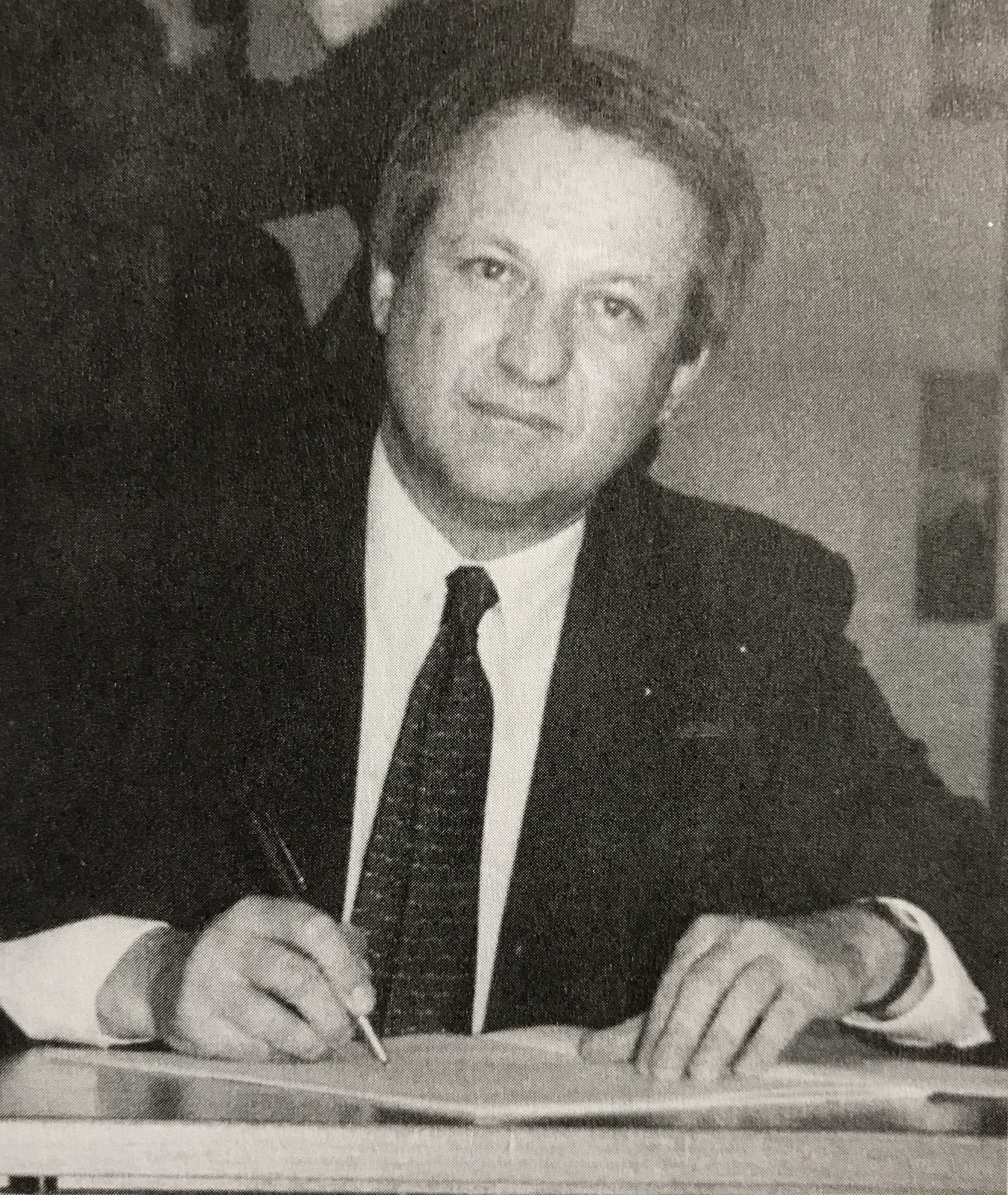 Victor Faccioni assina a Constituição de 1988.